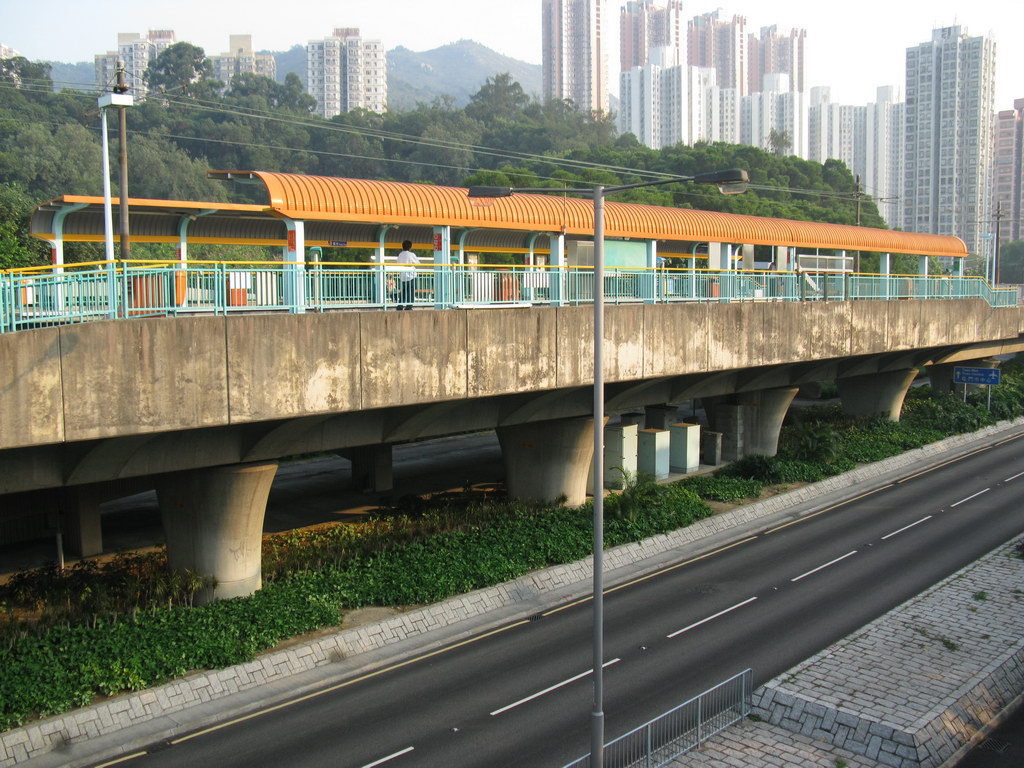 輕鐵 鳳地站 Fung Tei Stop, Light Rail